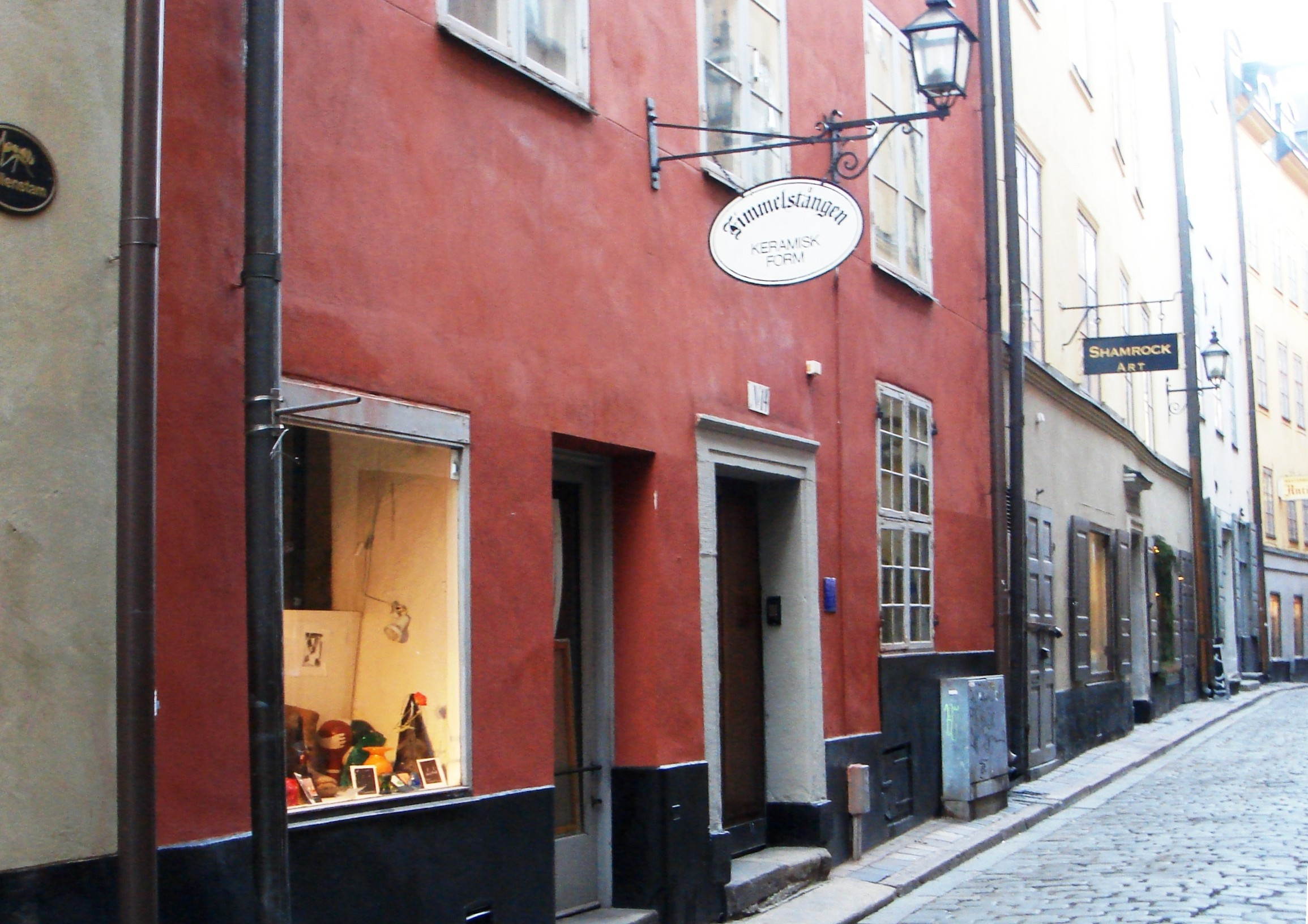 Kindstugatan 14, Gamla Stan, Stockholm, Sweden